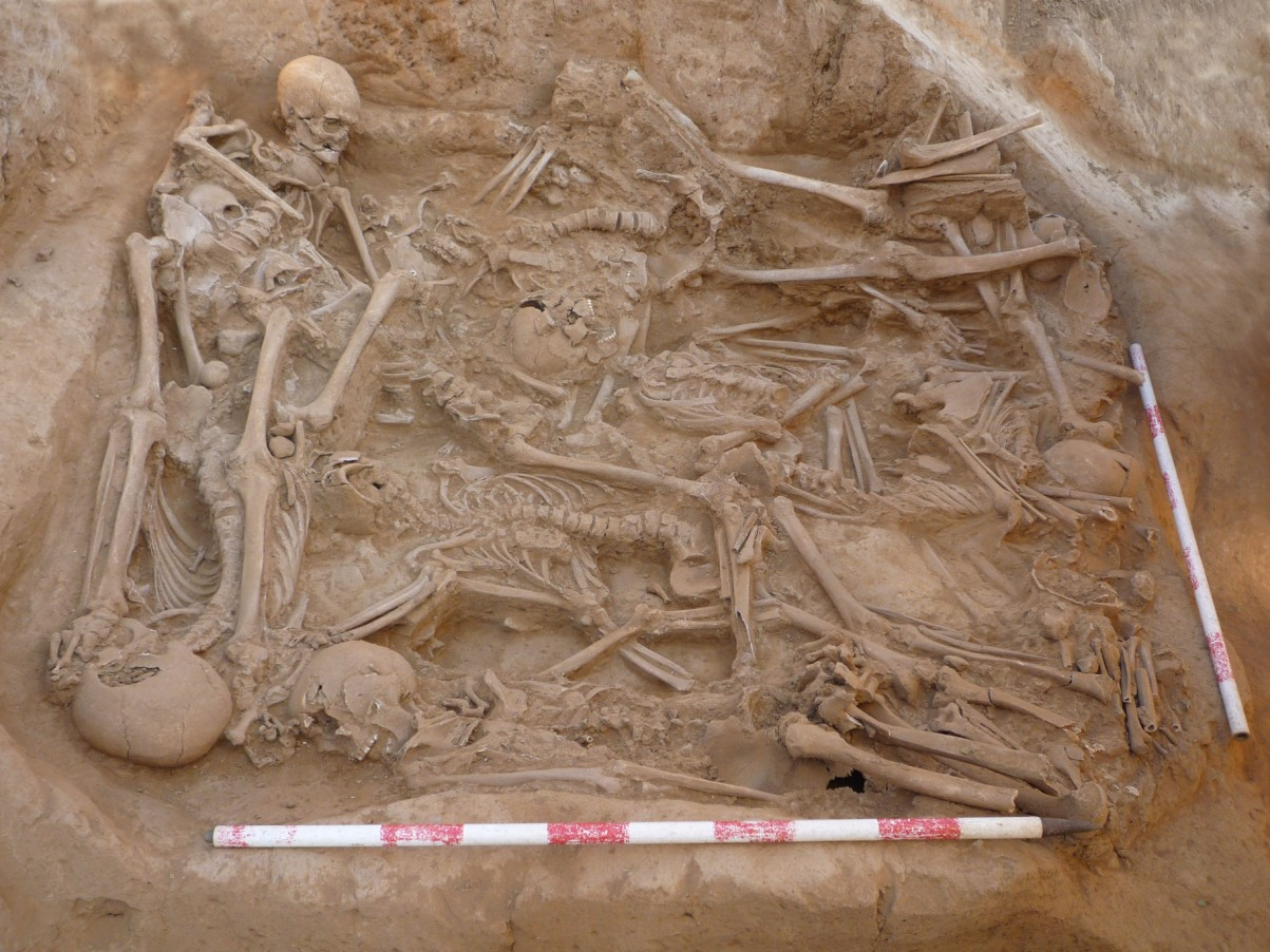 Fossa d'inhumació col.lèctiva de mitjans del segle XVII localitzada a les obres del LAV Sagrera. Foto: Estíbaliz Monguiló